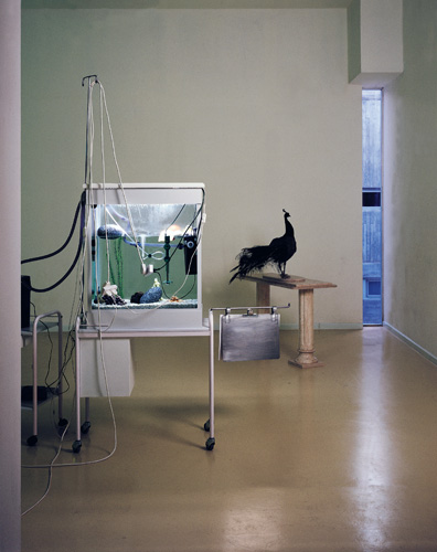 Sculpture